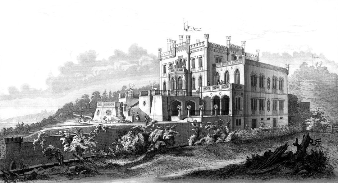 Villa Orlando in Loschwitz, erbaut 1848–1853, auf einer Darstellung von 1856.